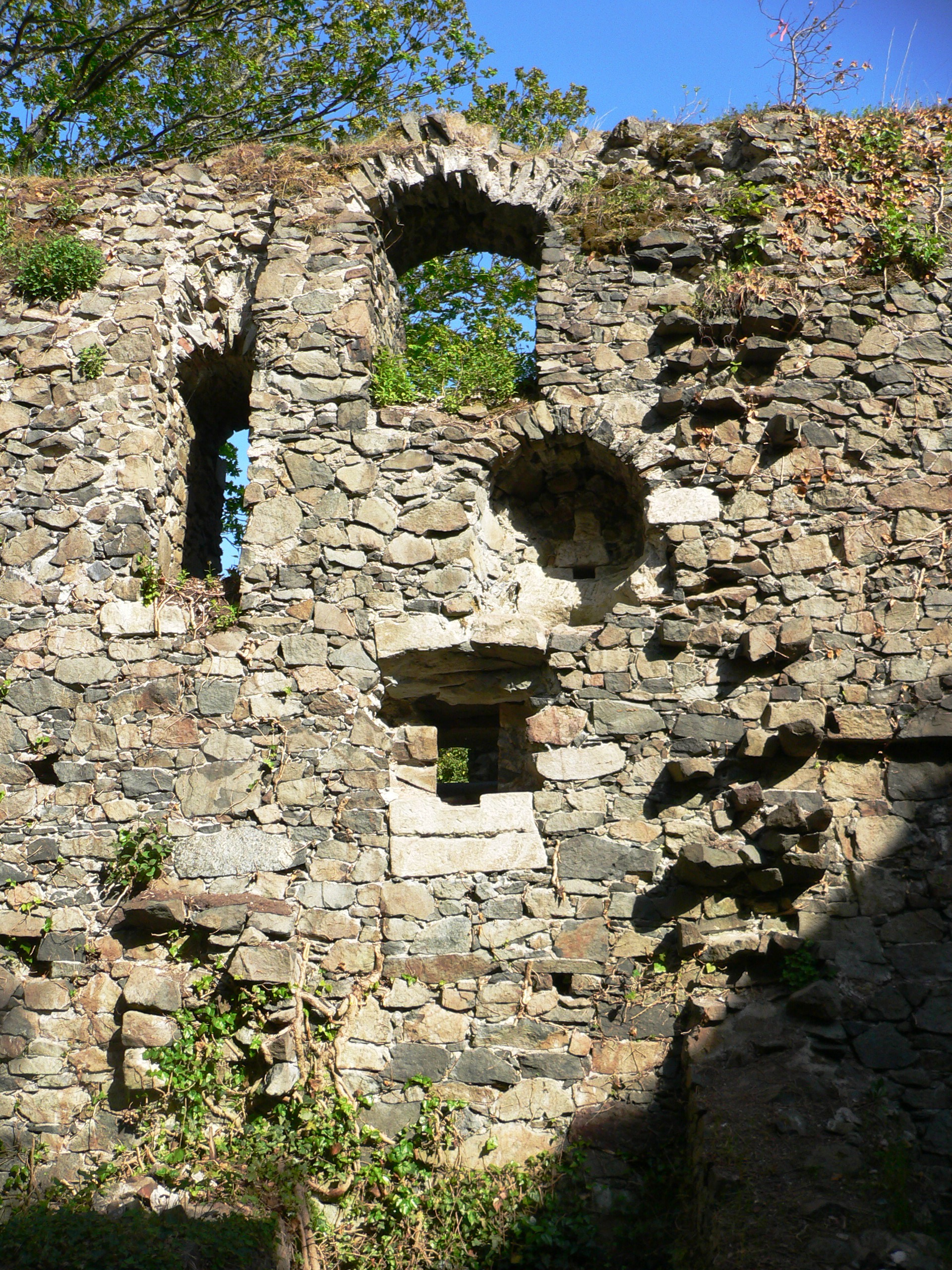 Palas der Hohenberneck, Ansicht der Ostwand von Innen